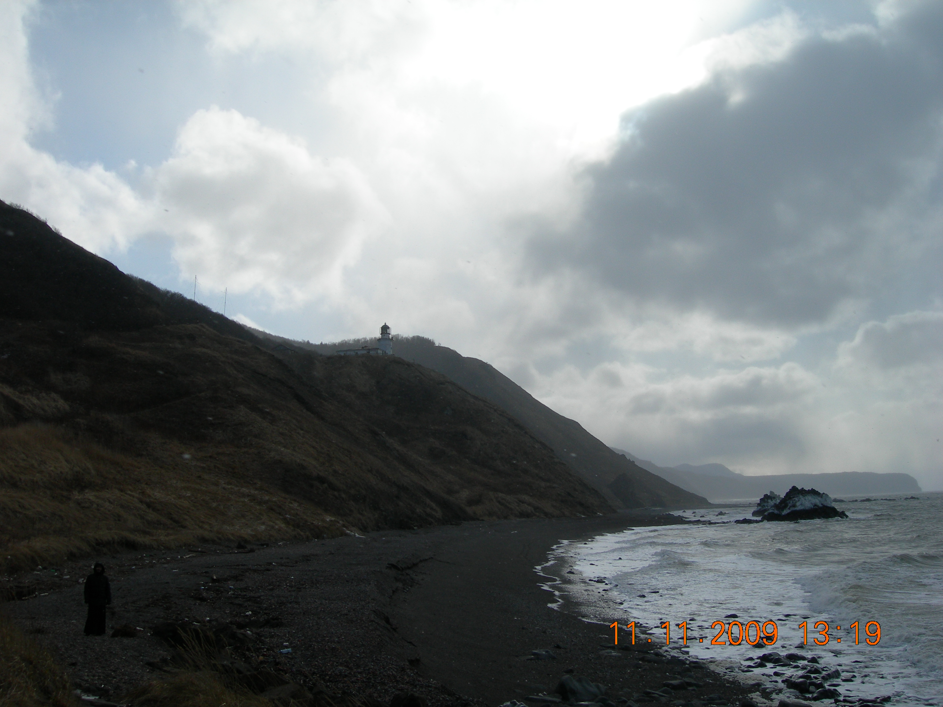 Маяк Жонкиер на берегу Татарского пролива. г.Александровск-Сахалинский, о.Сахалин.